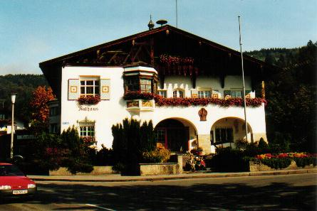 Rathaus Schliersee